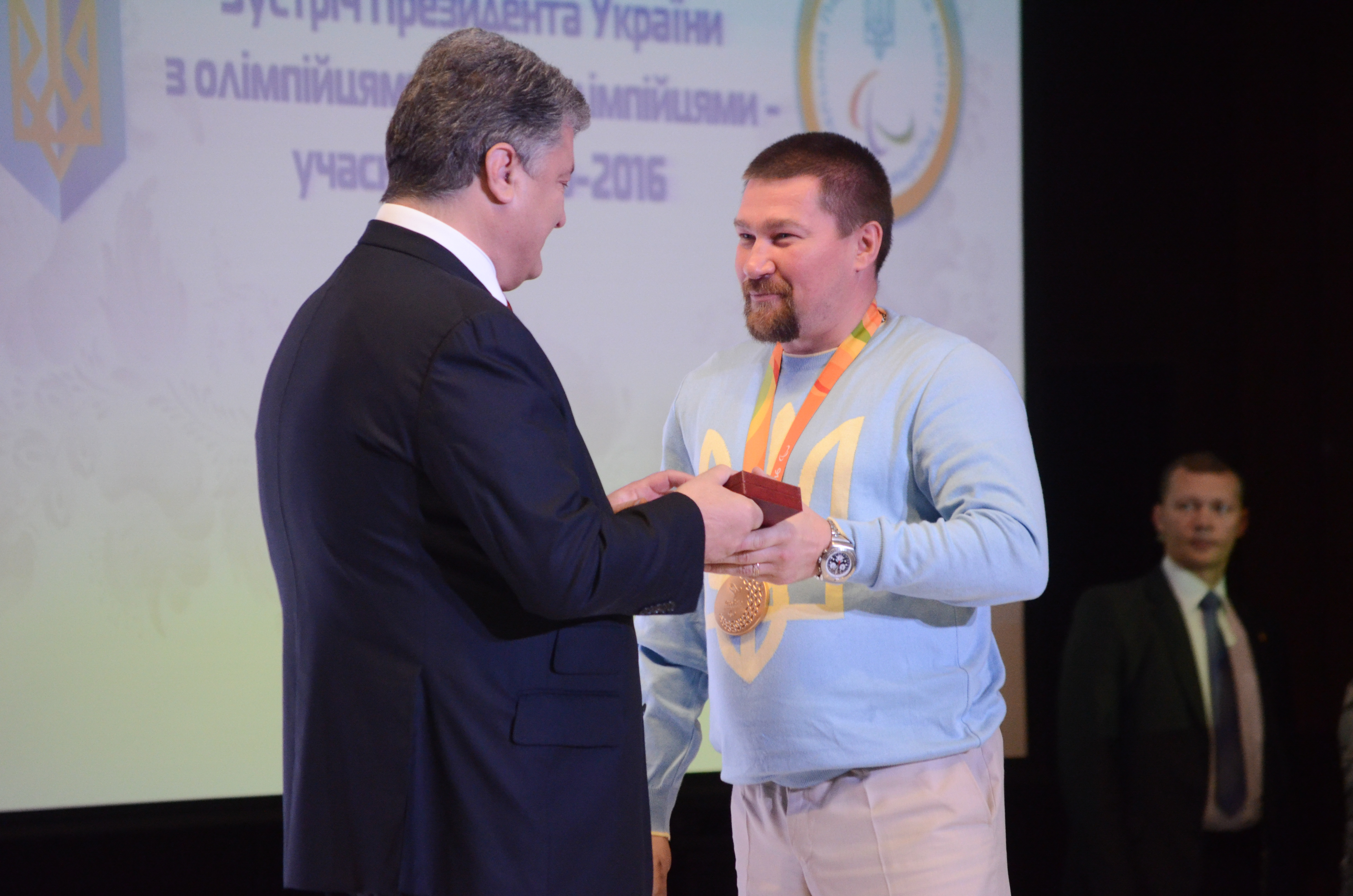 Зустріч Президента України з олімпійцями та паралімпійцями — учасниками Ріо-2016.